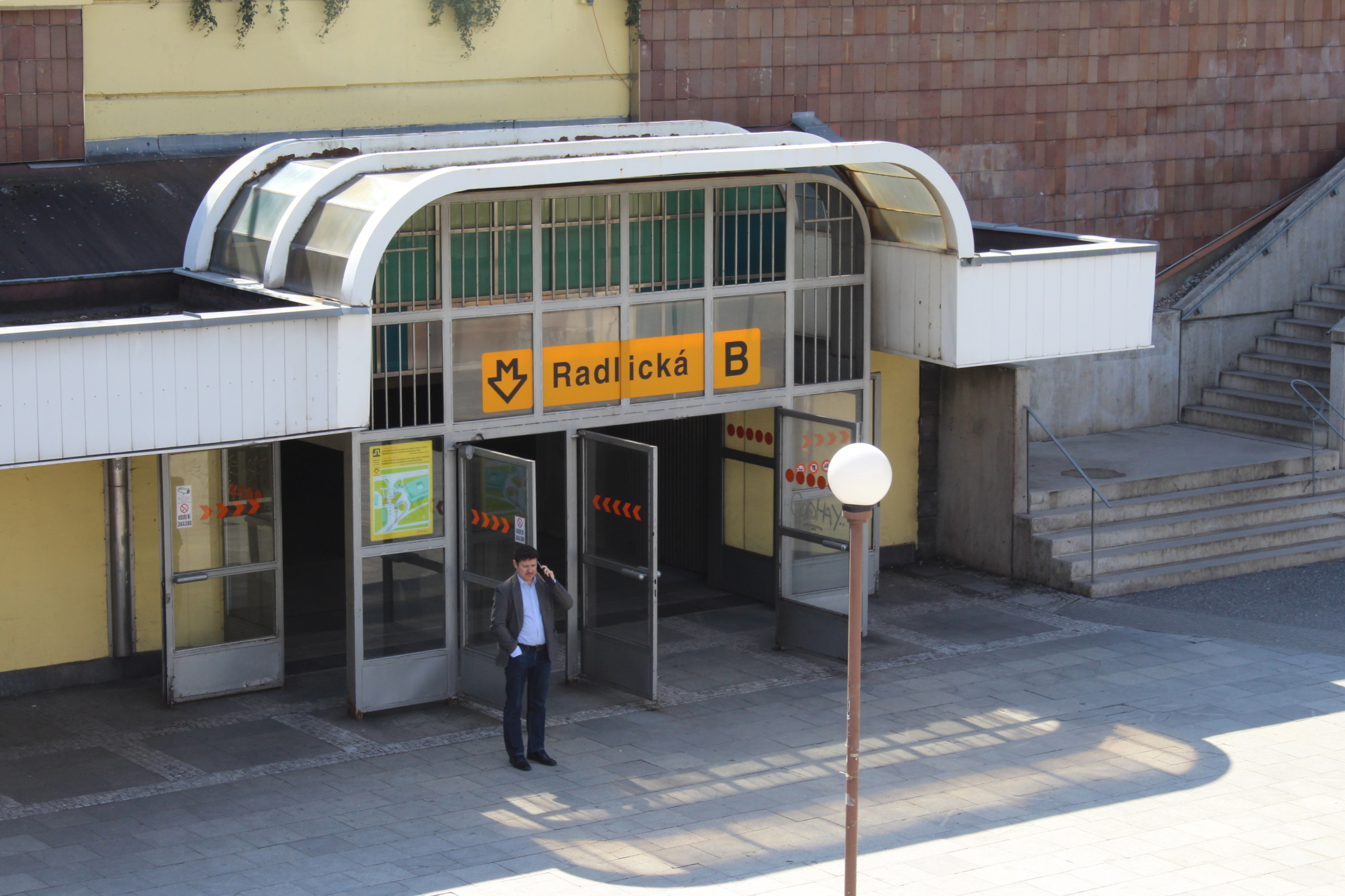 Stanice pražského metra, trasa B, Radlická